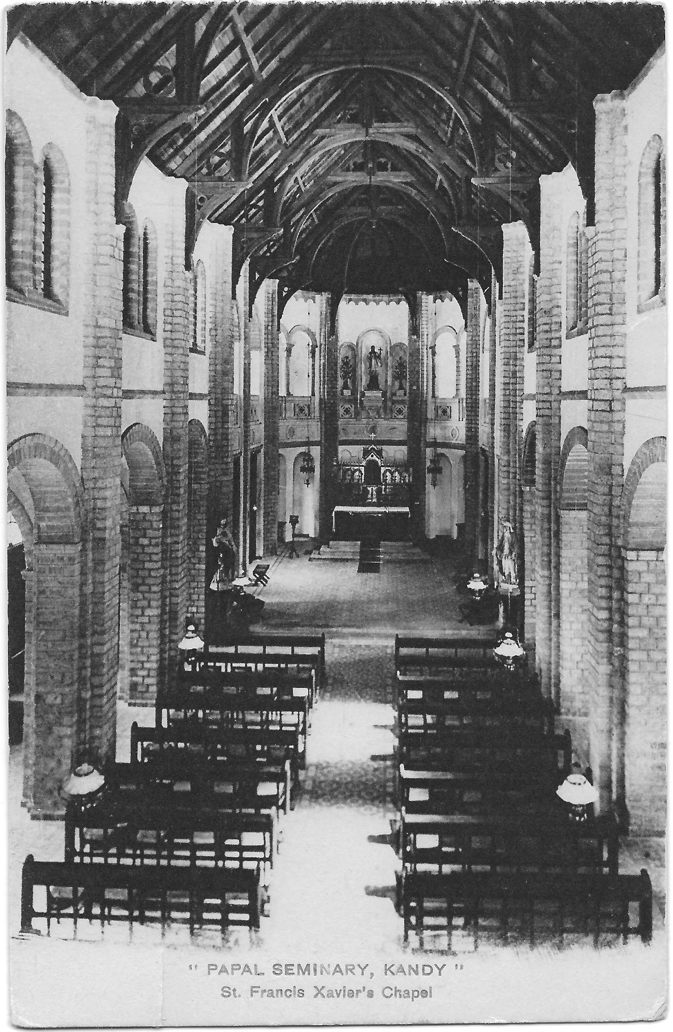 De vroegere pauselijke seminarie in Ampitiya, dicht bij Kandy, Sri Lanka. Maakt nu deel uit van de National Seminary of Our Lady of Landa.